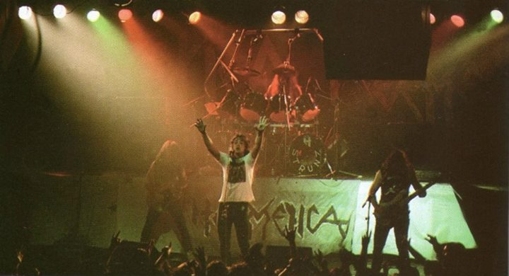 Hermética en concierto, Antonio Romano, Claudio O'Connor, Claudio Strunz, Ricardo Iorio